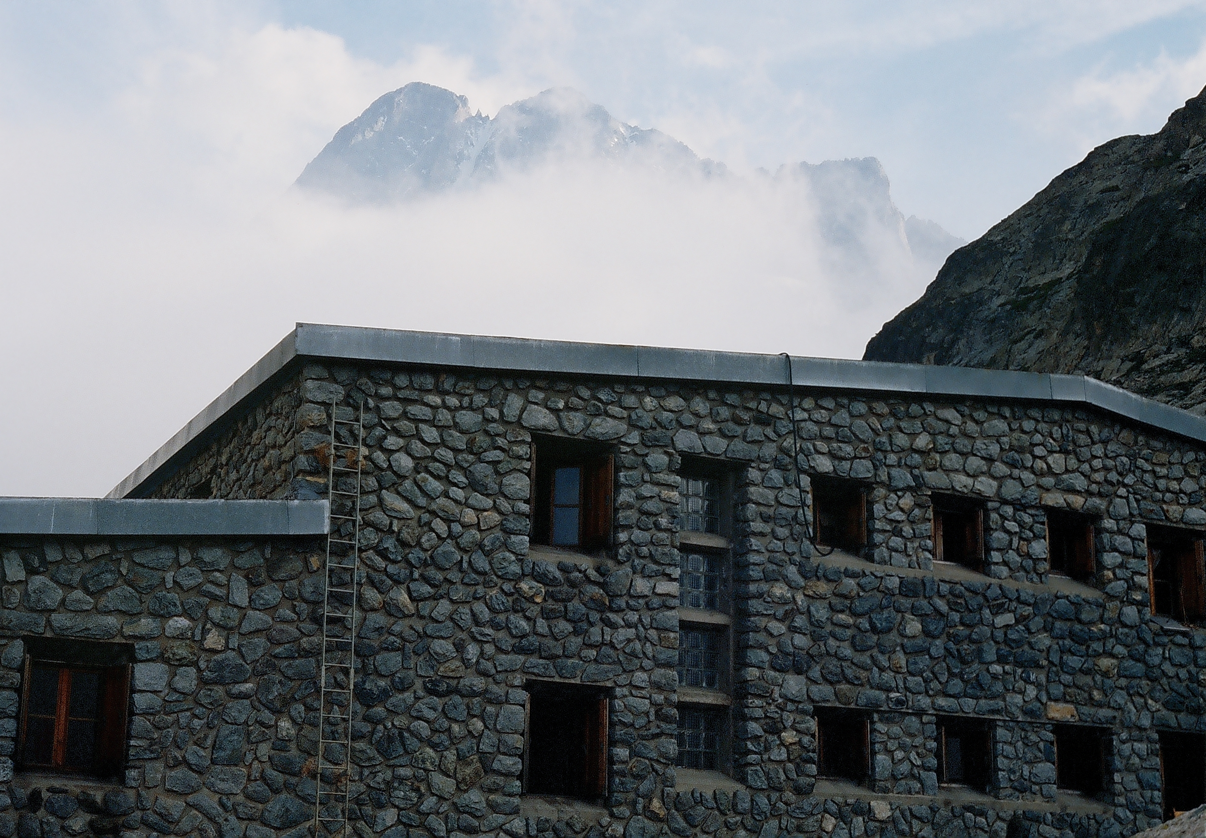 Refuge de la Pilatte, massif des Écrins, France.